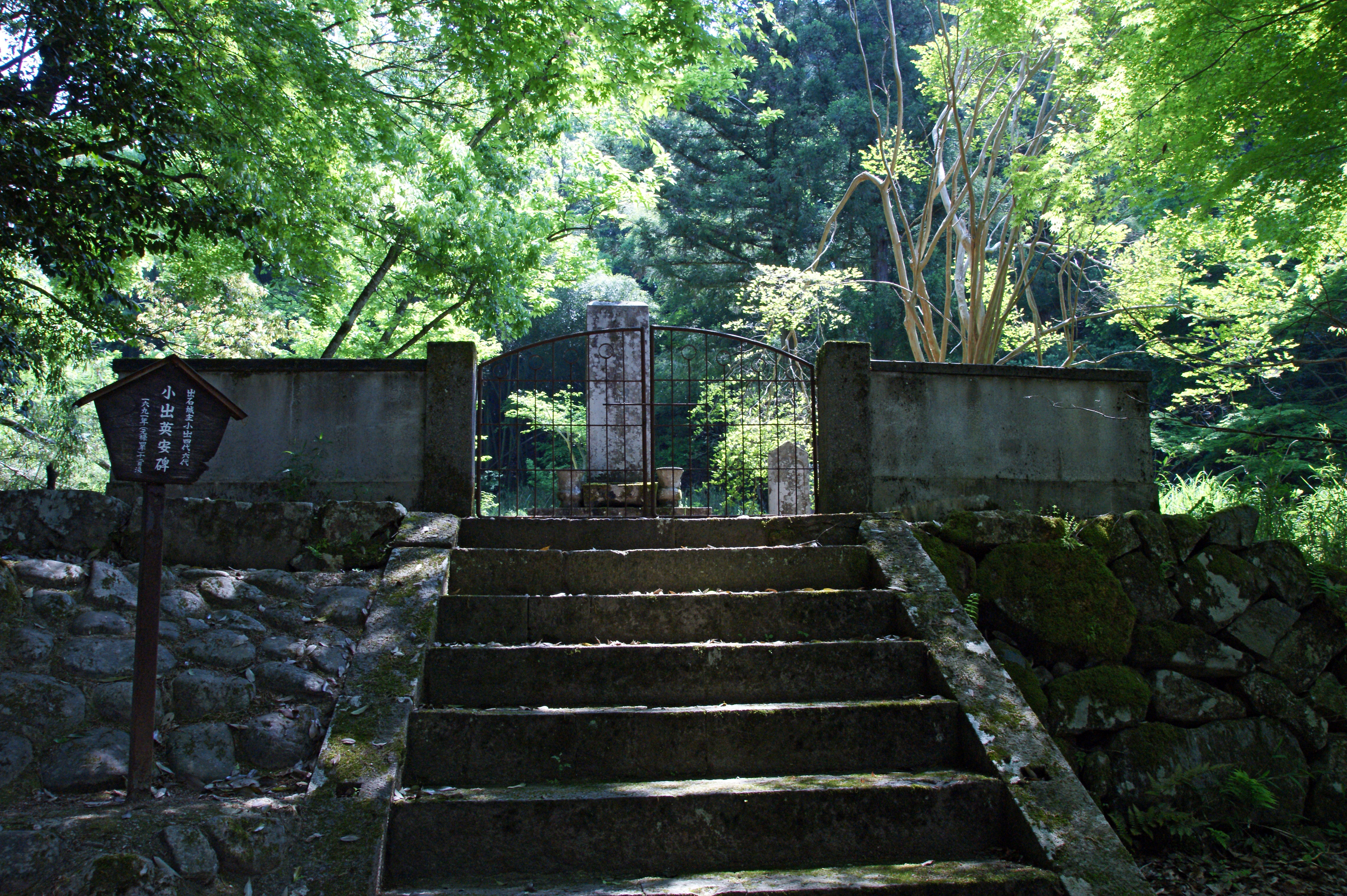 Sukyoji in Izushi, Toyooka, Hyogo prefecture, Japan